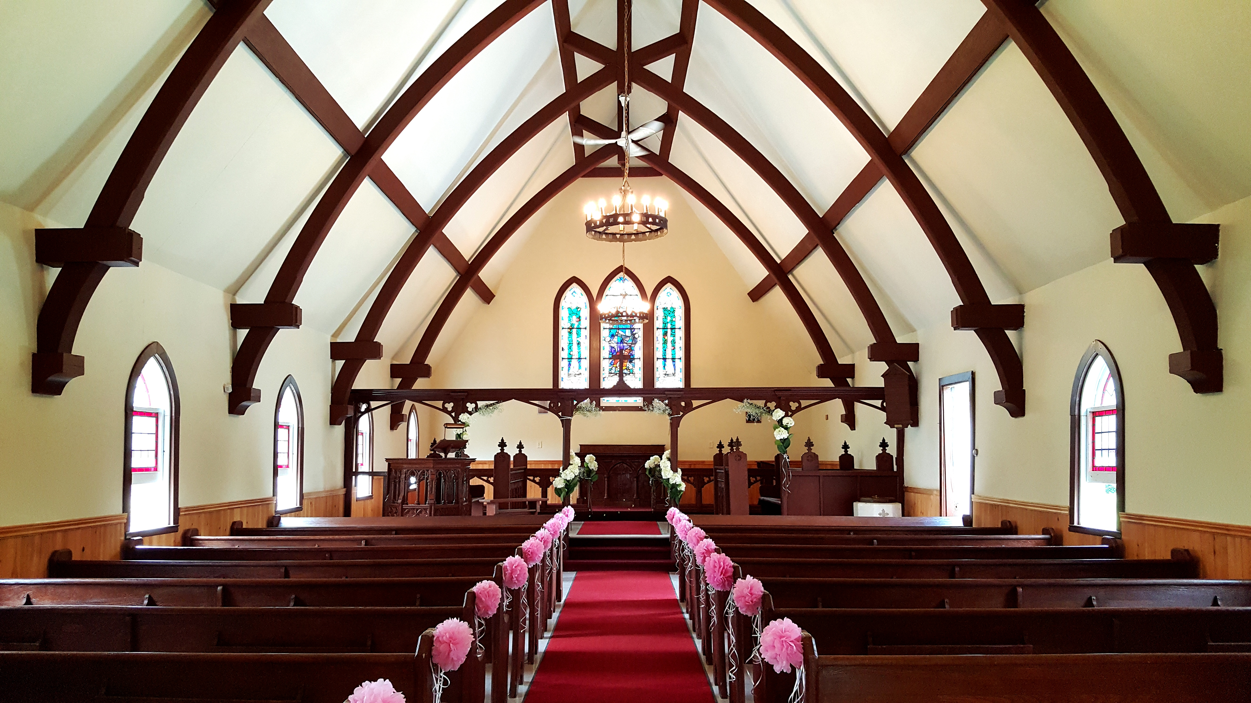 St-Andrew La Tuque - juillet 2016